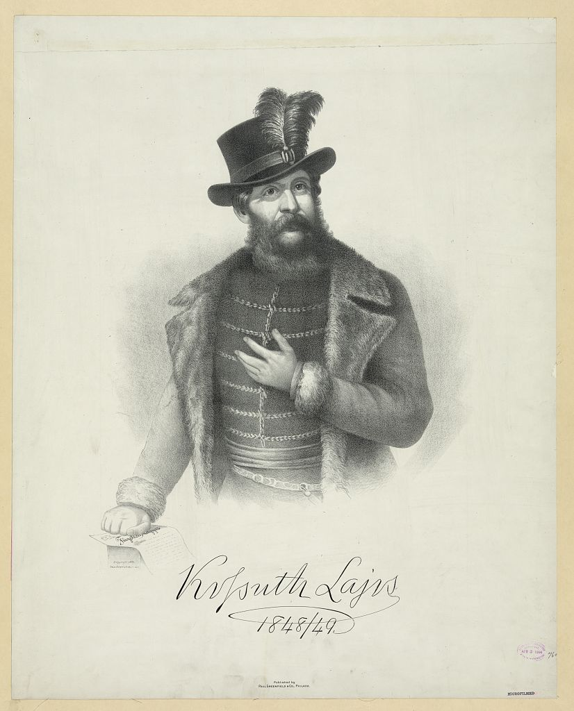 Kossuth Lajos portré